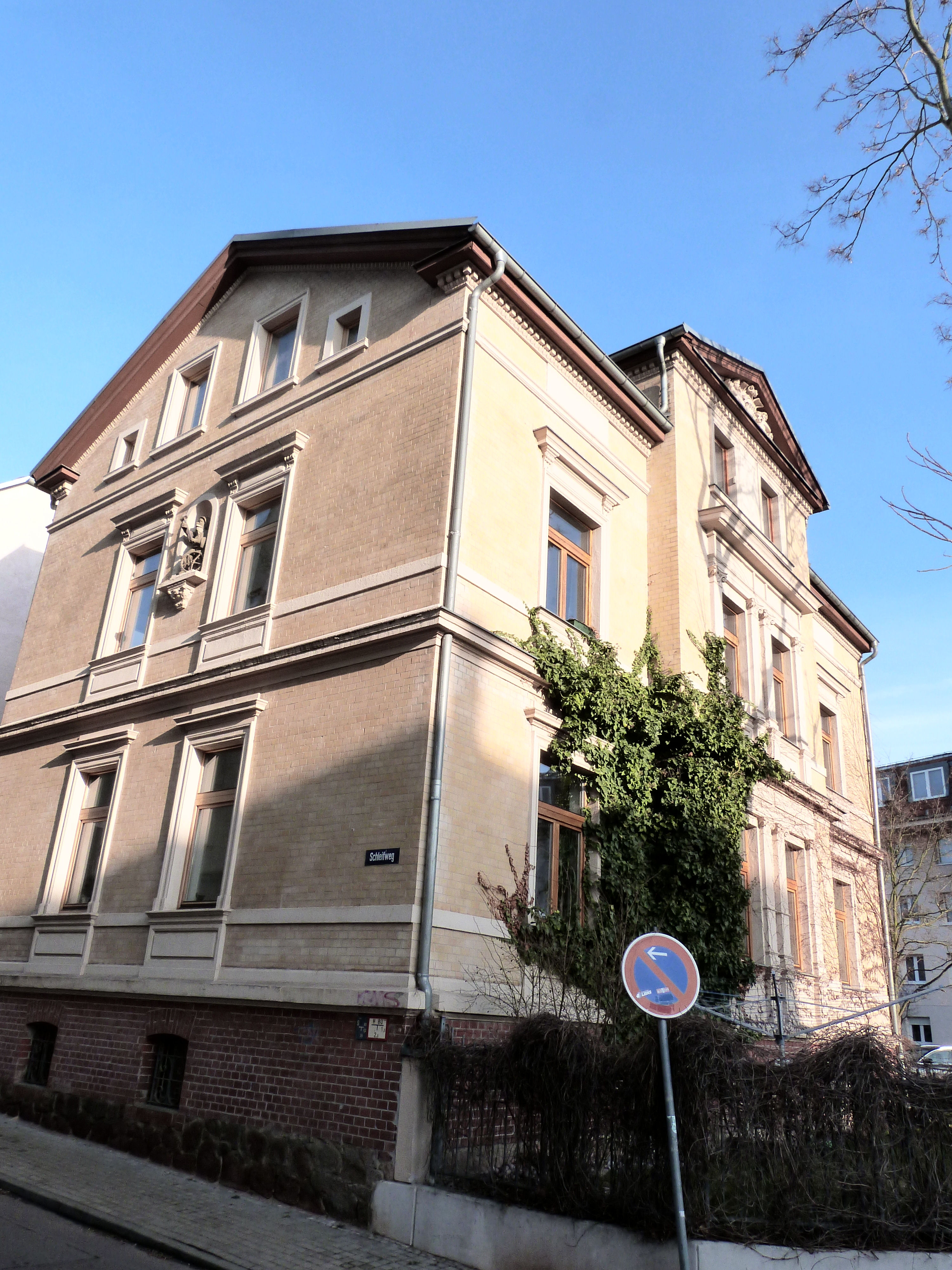 Villa Schleifweg 14, Halle (Saale)